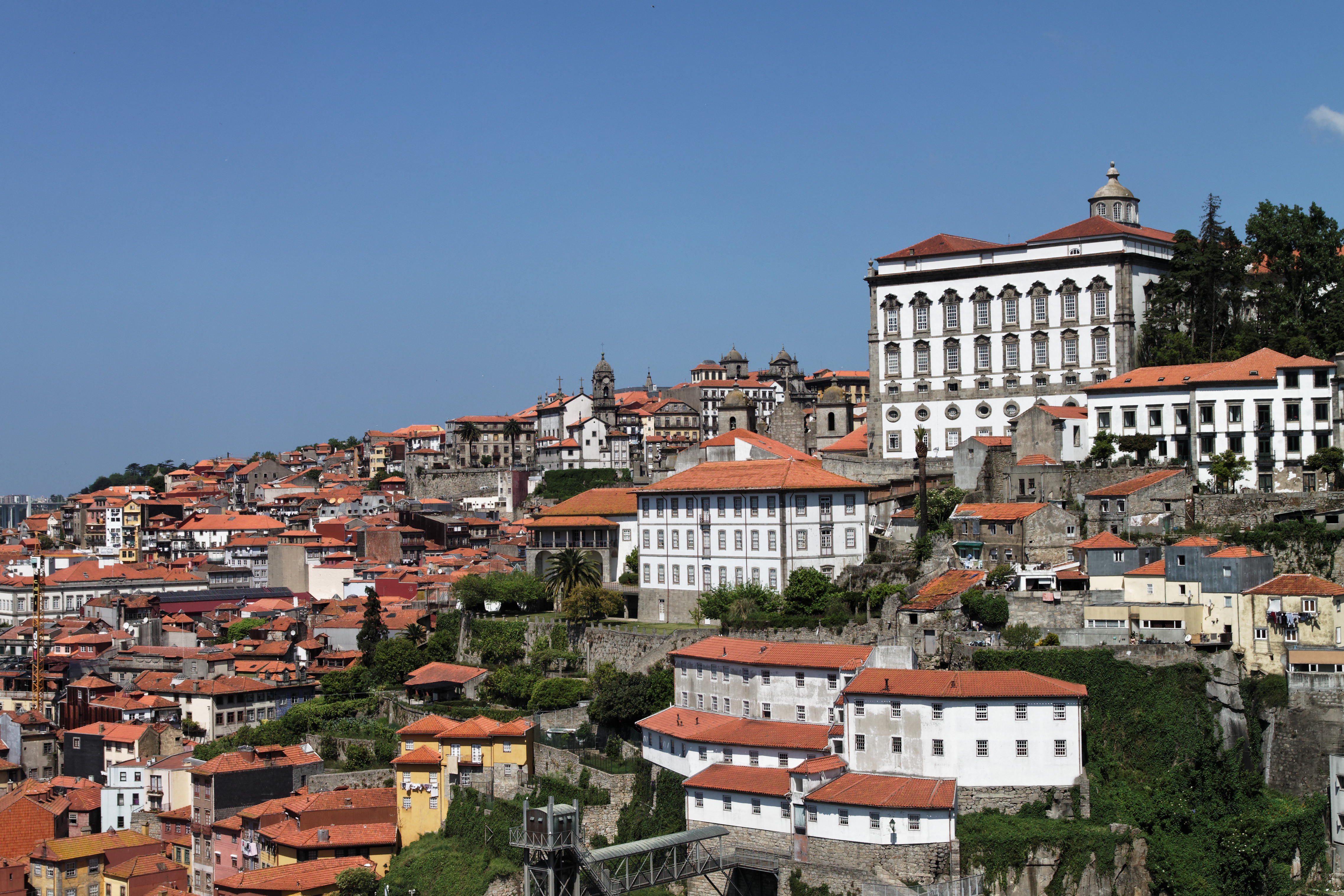 Vista de la ciudad de Oporto junto al río Duero. Oporto, Portugal.